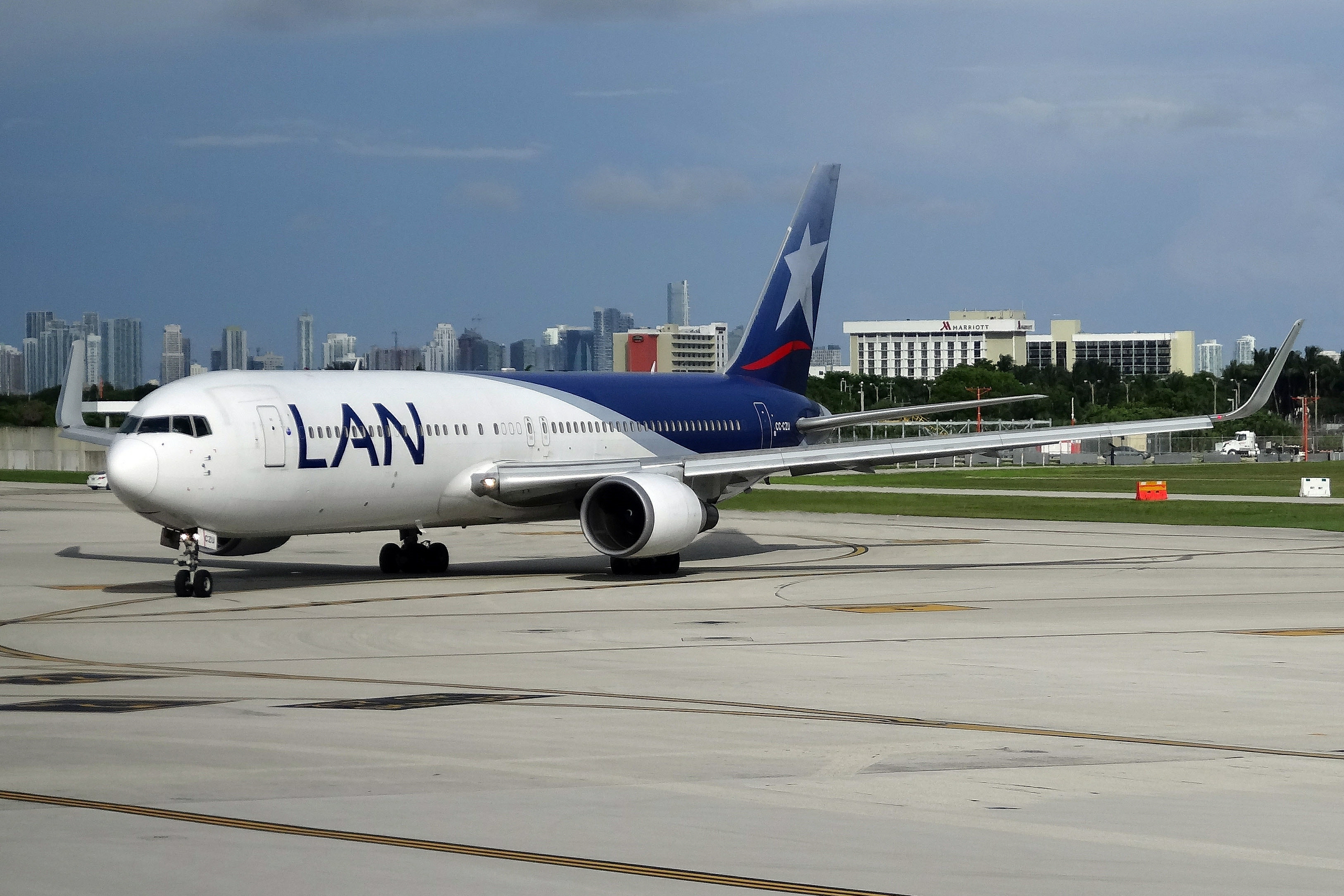 MSN 29229 LN 729 B767-316ER LAN AIRLINES MIA